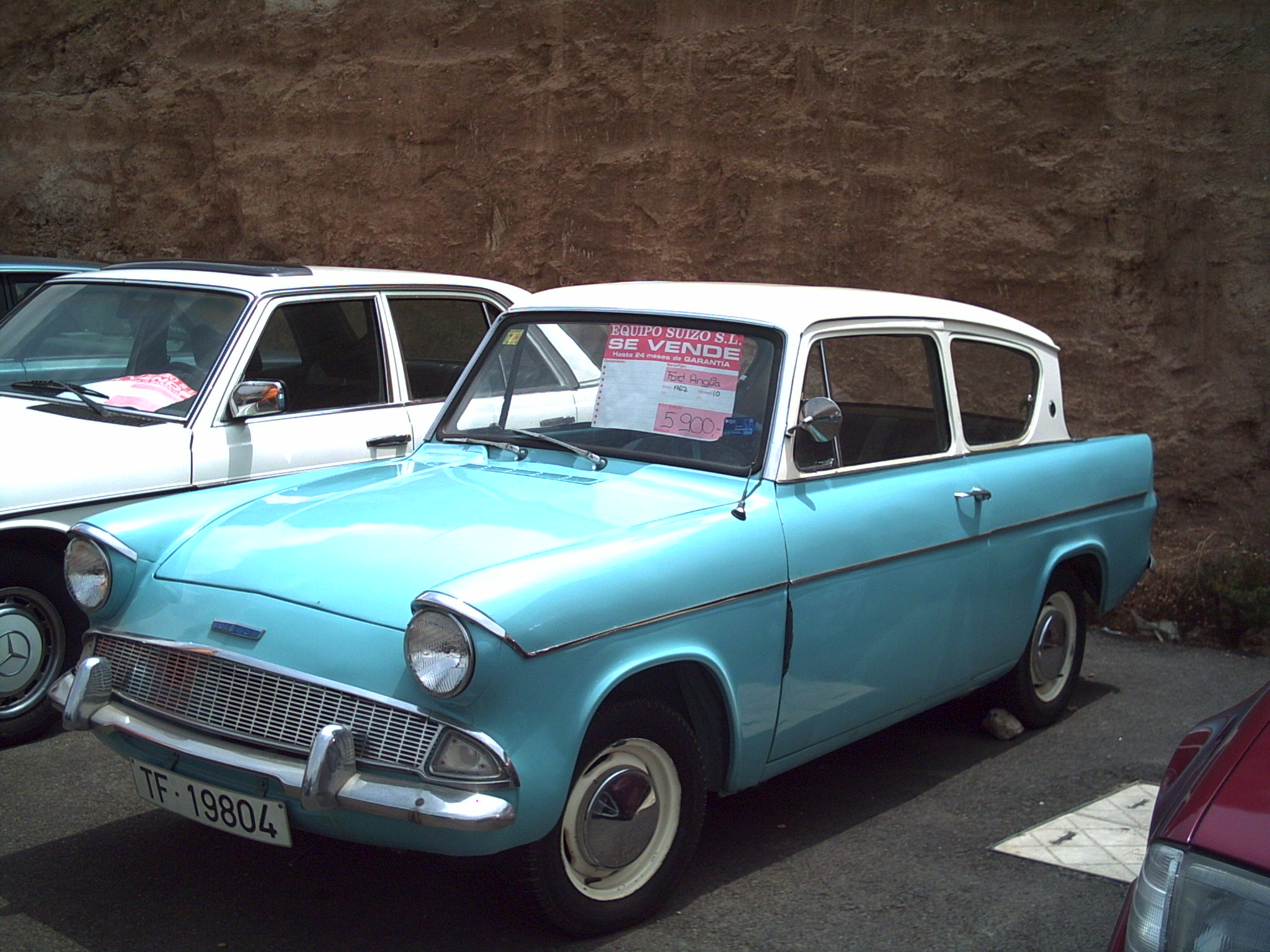 Ford Anglia Tenerife